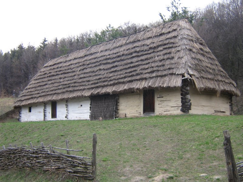 Хата з села Стрічава Закарпатської області